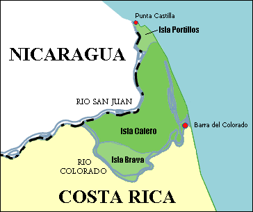 Mapa de las Islas Calero, Brava y Portillos, Costa Rica.